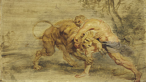 Schilderij dat de strijd tussen Herakles en de Nemeïsche leeuw afbeeld.